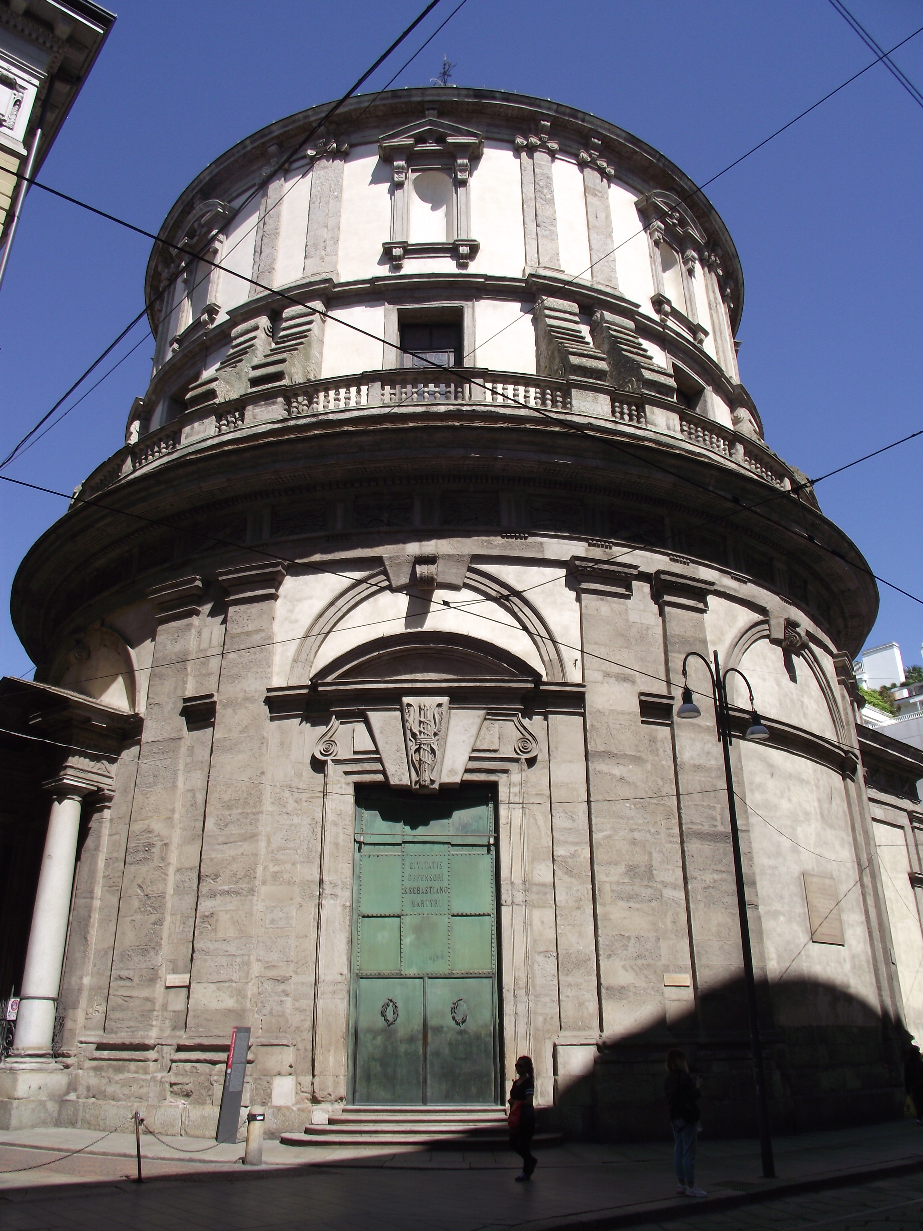 Esterno